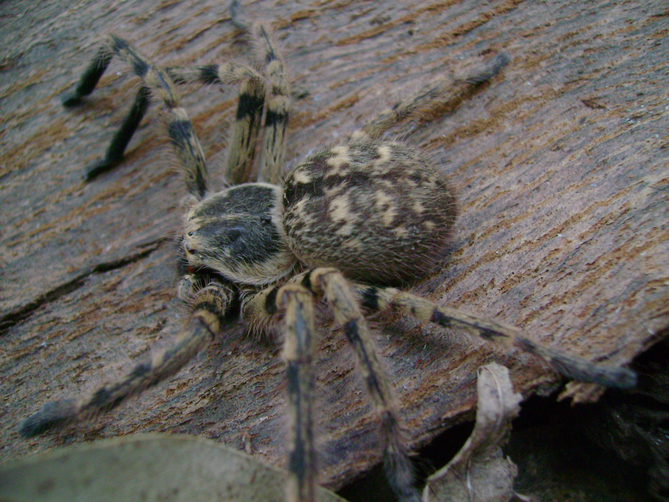 Polybetes, foto tomada en el monte del hospital de General Rodriguez, Buenos Aires, Argentina supongo que es del género Polybetes, aunque no estoy realmente seguro.